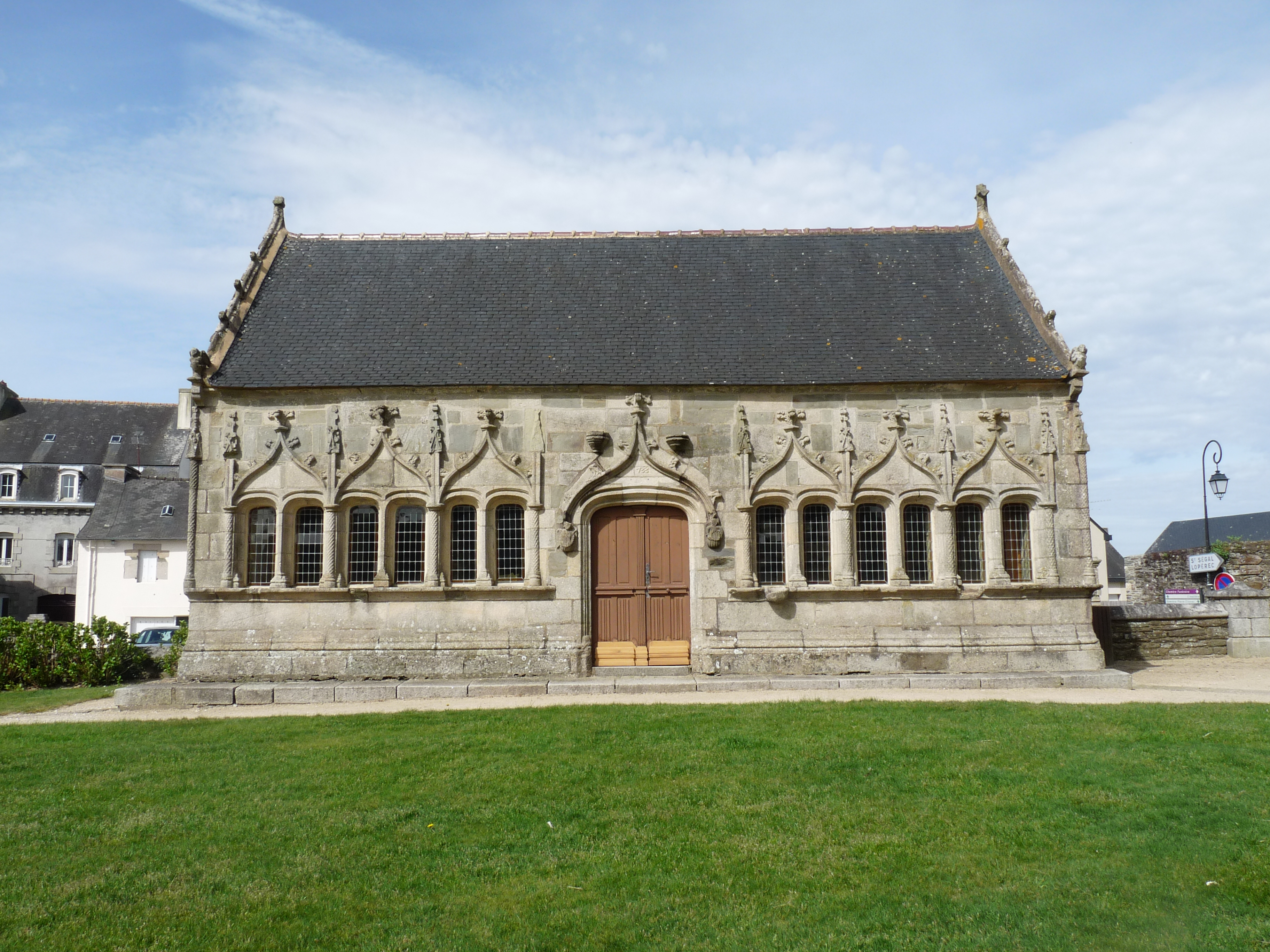 Chapelle funéraire de l'enclos paroissial de Pleyben (Finistère)